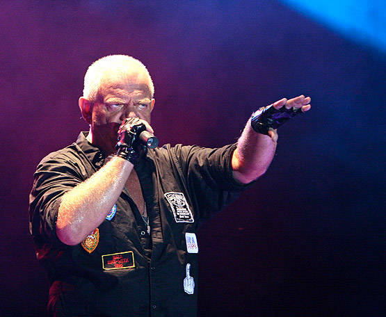 Udo Dirkschneider en Vigo durante el Festival AlternaVigo 2009